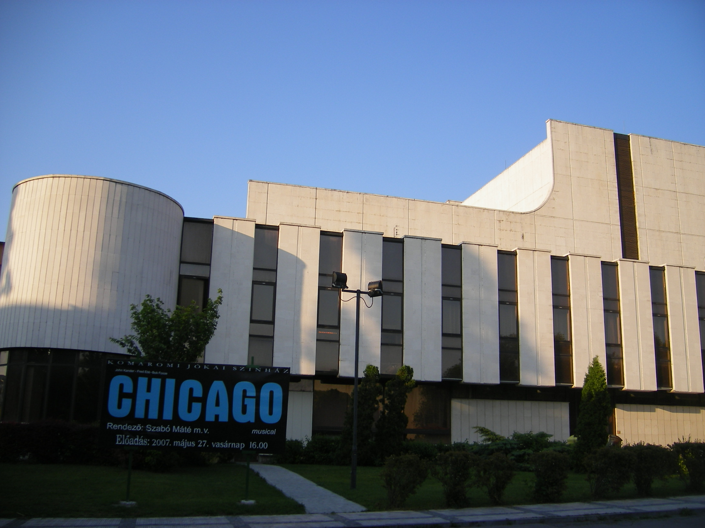 Komárom - Jókai Színház